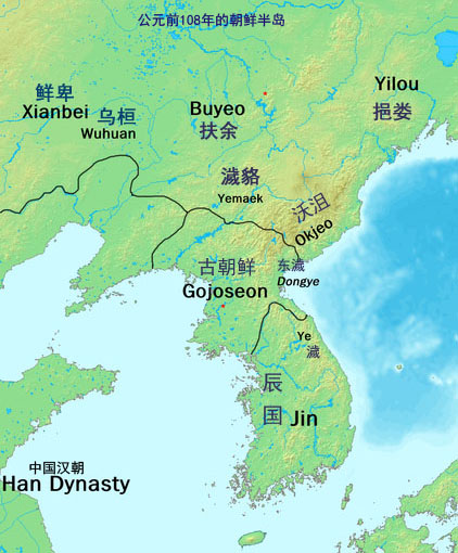 Korea 108BC